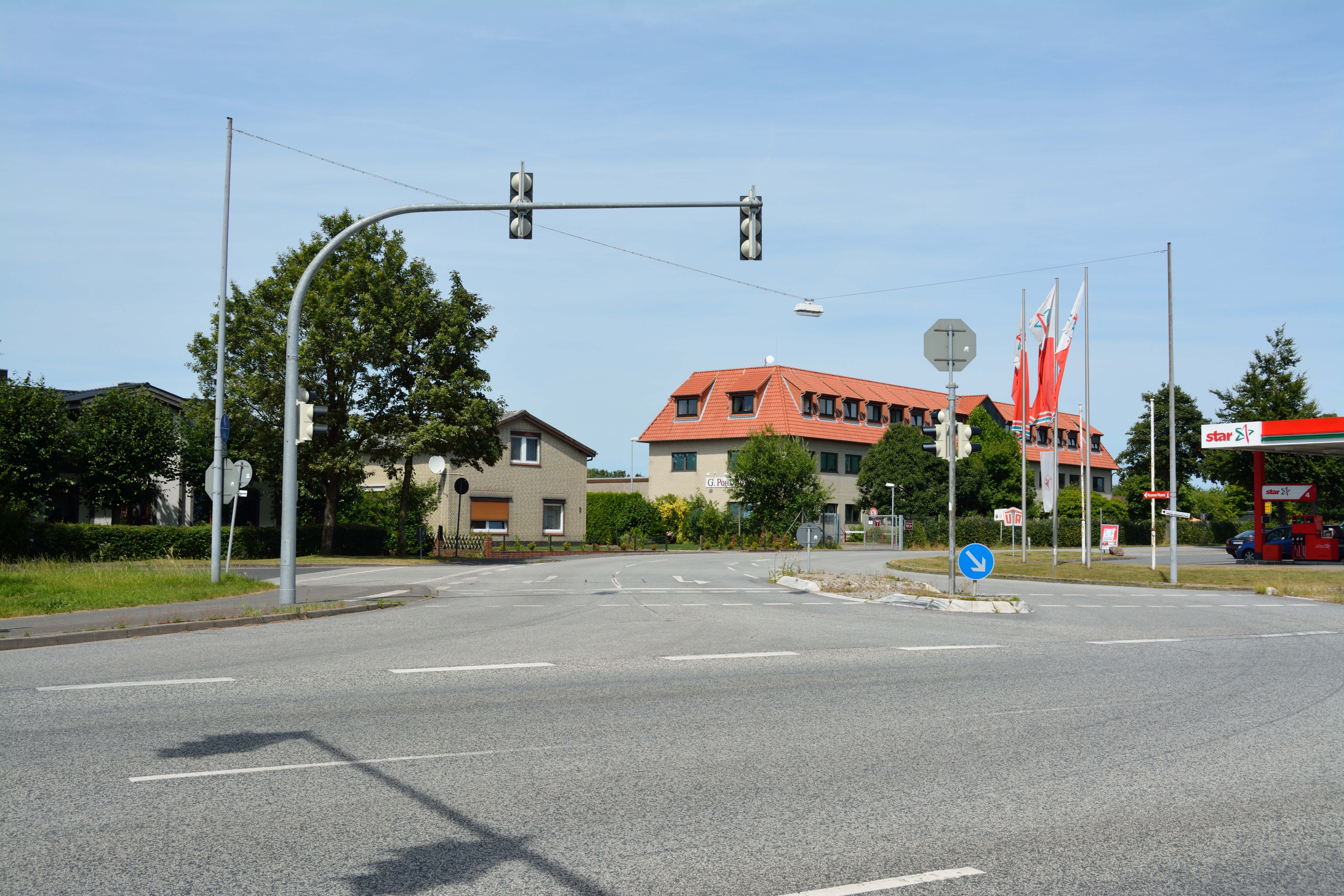 Ende der Landesstrasse 121 in Hohenlockstedt, Einmündung in die Bundesstrasse 206